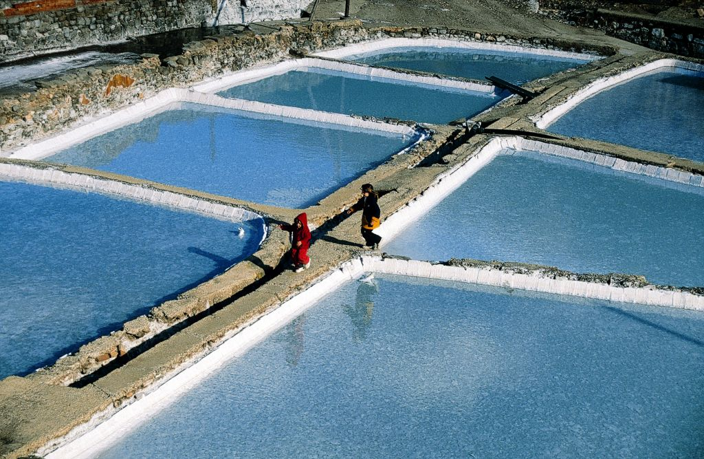 salinas de Peralta